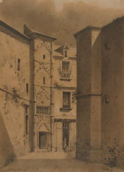 Un dessin de Louis Moullin représentant la maison de la reine Bérengère et datant de 1855.